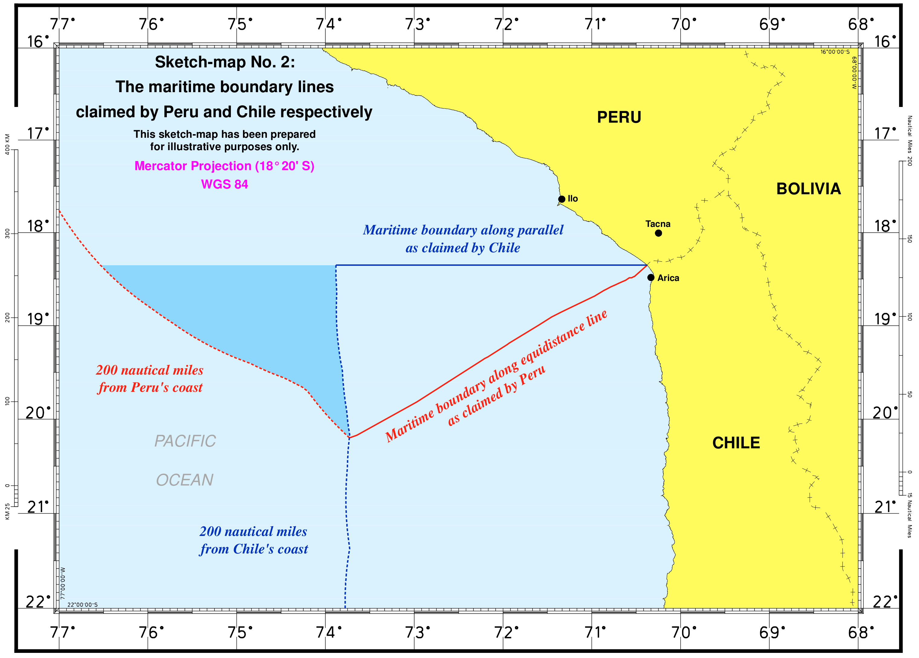 Mapa esquemático número 2 de la sentencia del 27 de enero de 2014 de la Corte Internacional de Justicia sobre la disputa de la frontera marítima entre Perú y Chile.